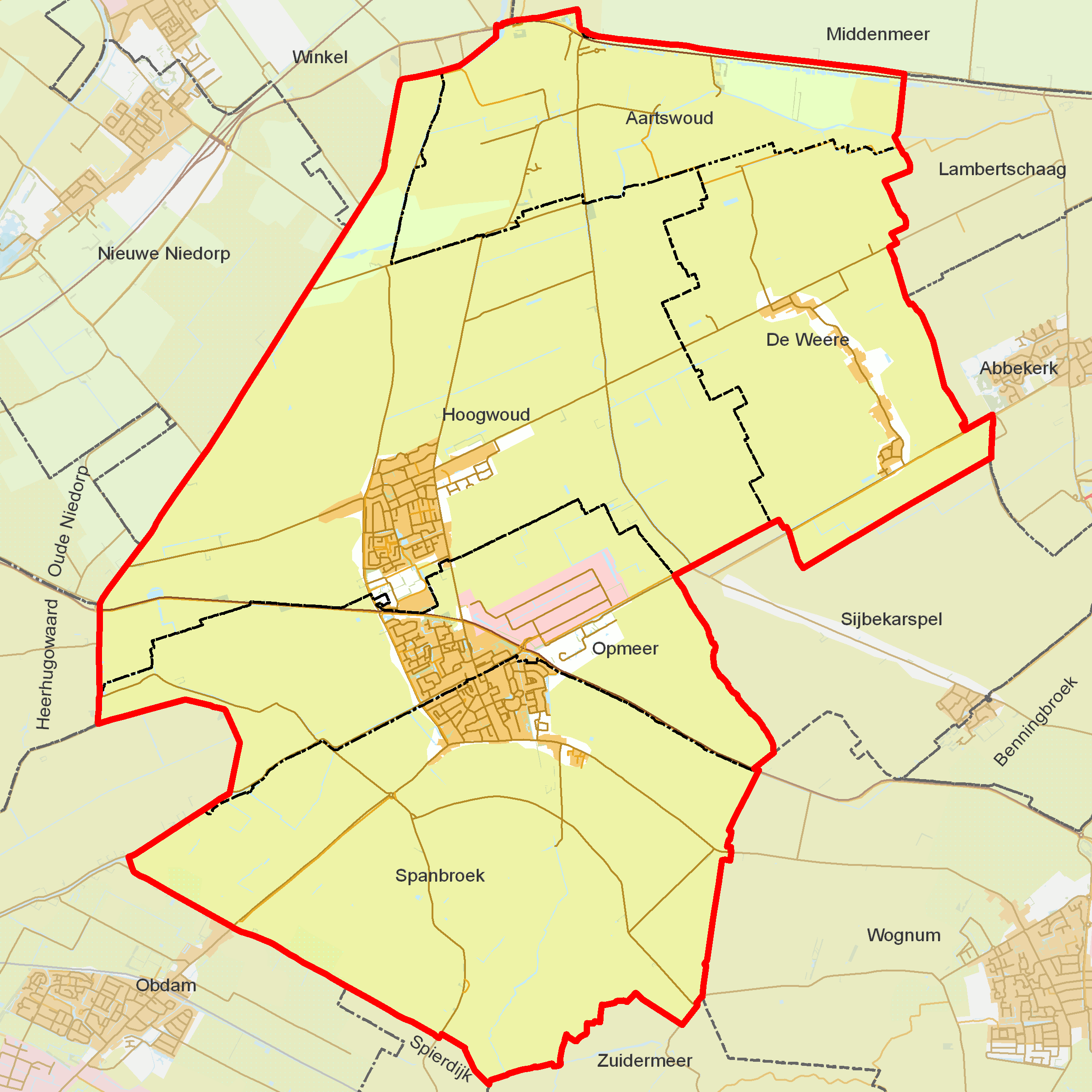 BAG woonplaatsen - Gemeente Opmeer.png